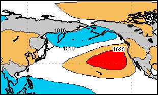 Гавайский антициклон (красный цвет)